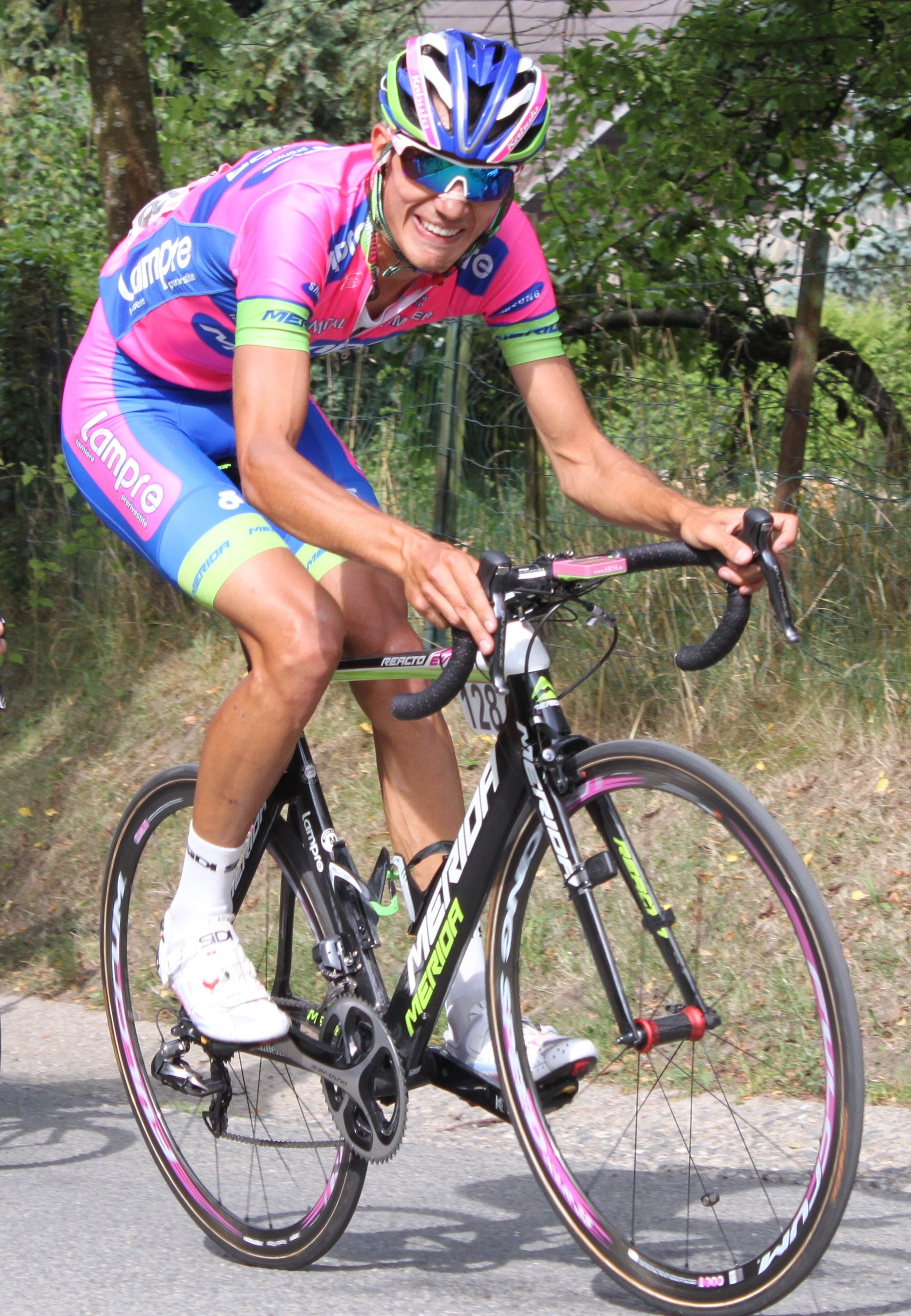 Luca Wackermann lors de l'Eneco Tour 2013.